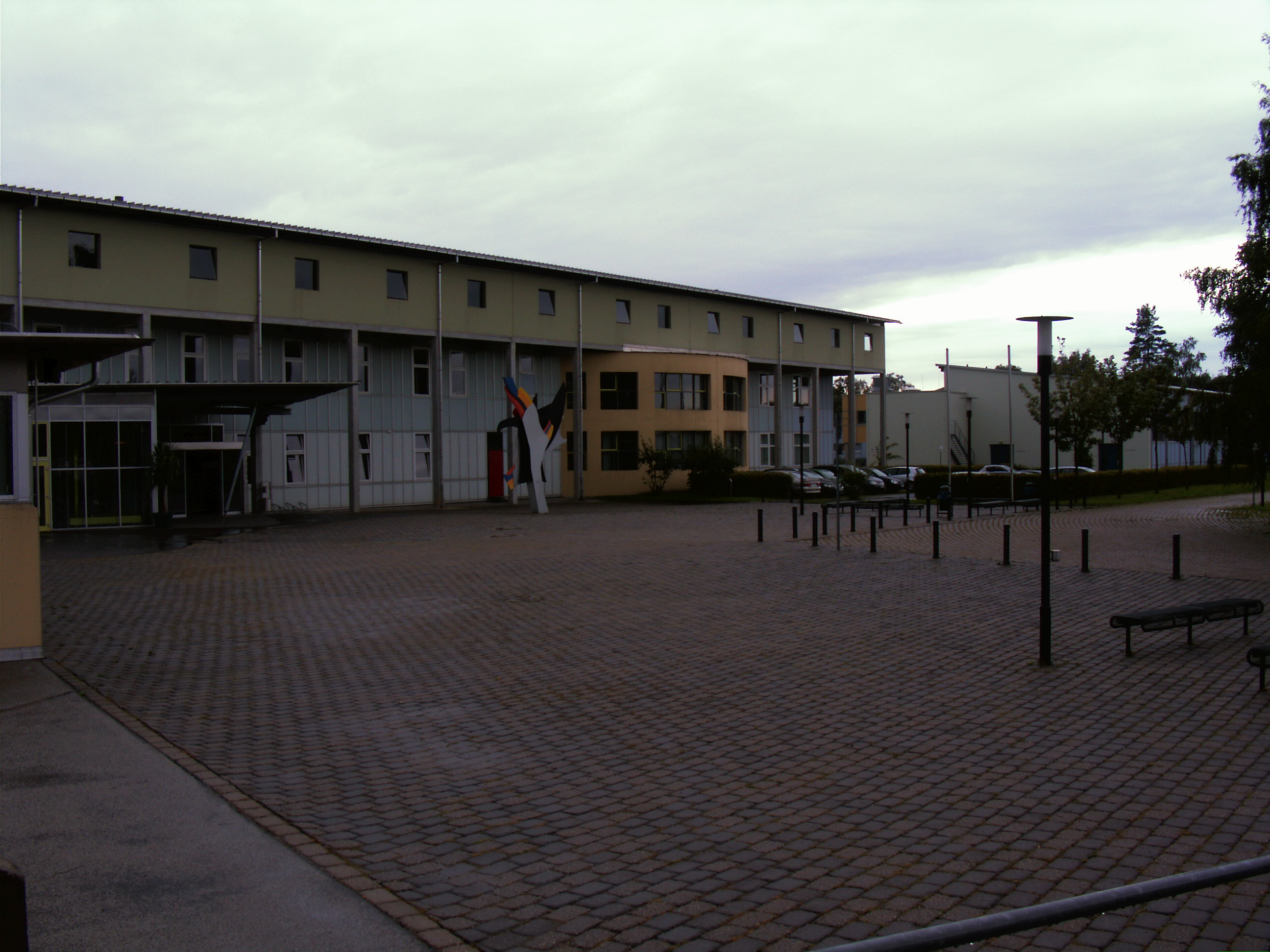 Das Ausbildungszentrum Bobritzsch, Hauptlehr- und Verwaltungsgebäude mit Eingang (links), rechts im Hintergrund die Mehrzweckhalle